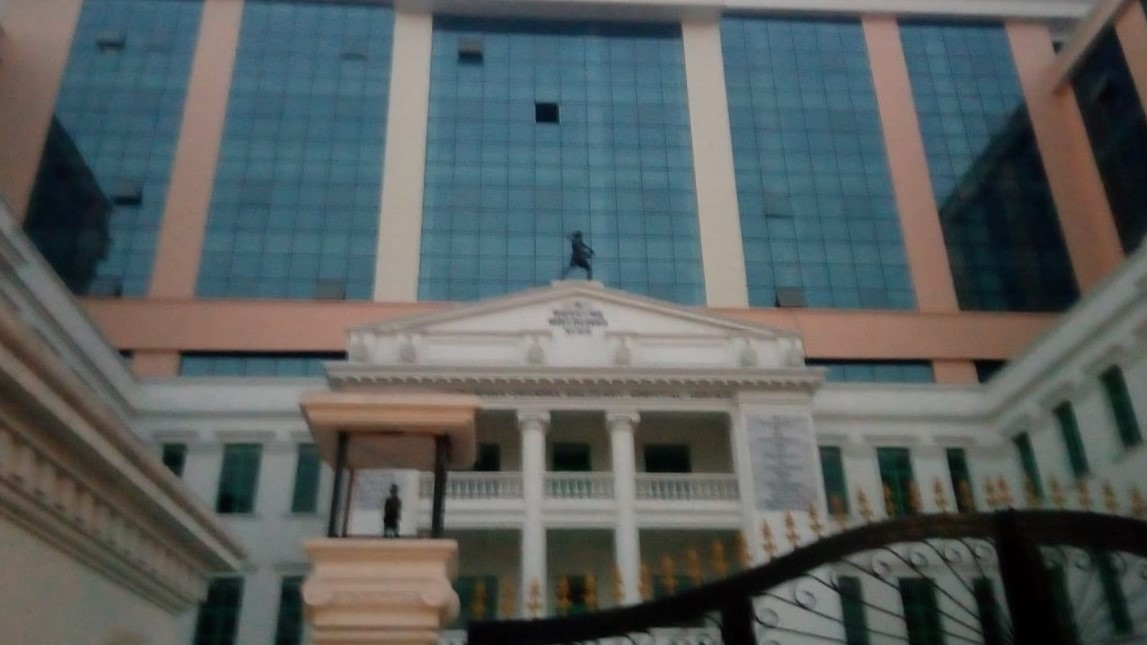 नेपाली: त्रि–चन्द्र मिलिटरी अस्पताल, महांकाल काठमाडौँ